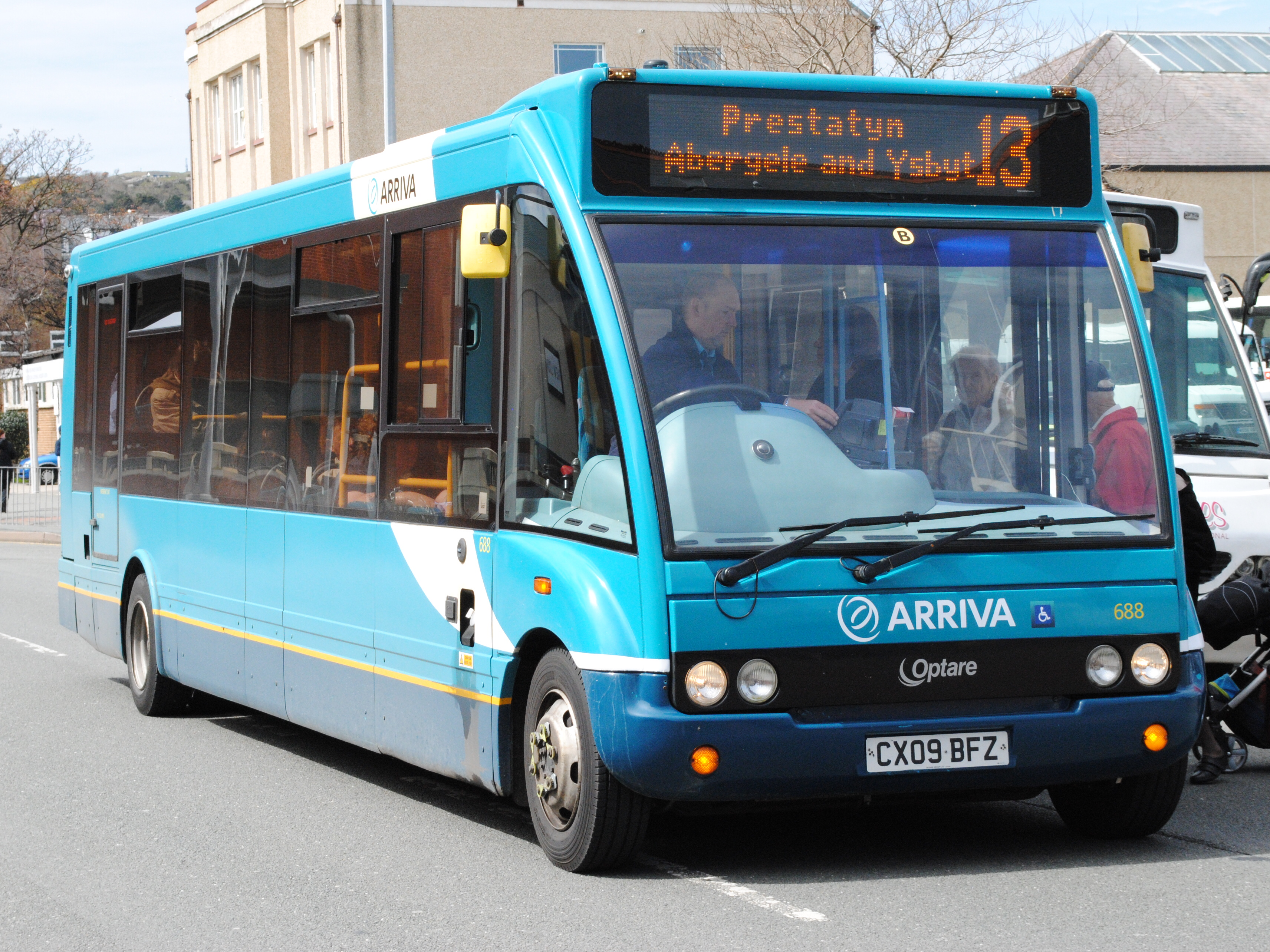 Optare Solo M950